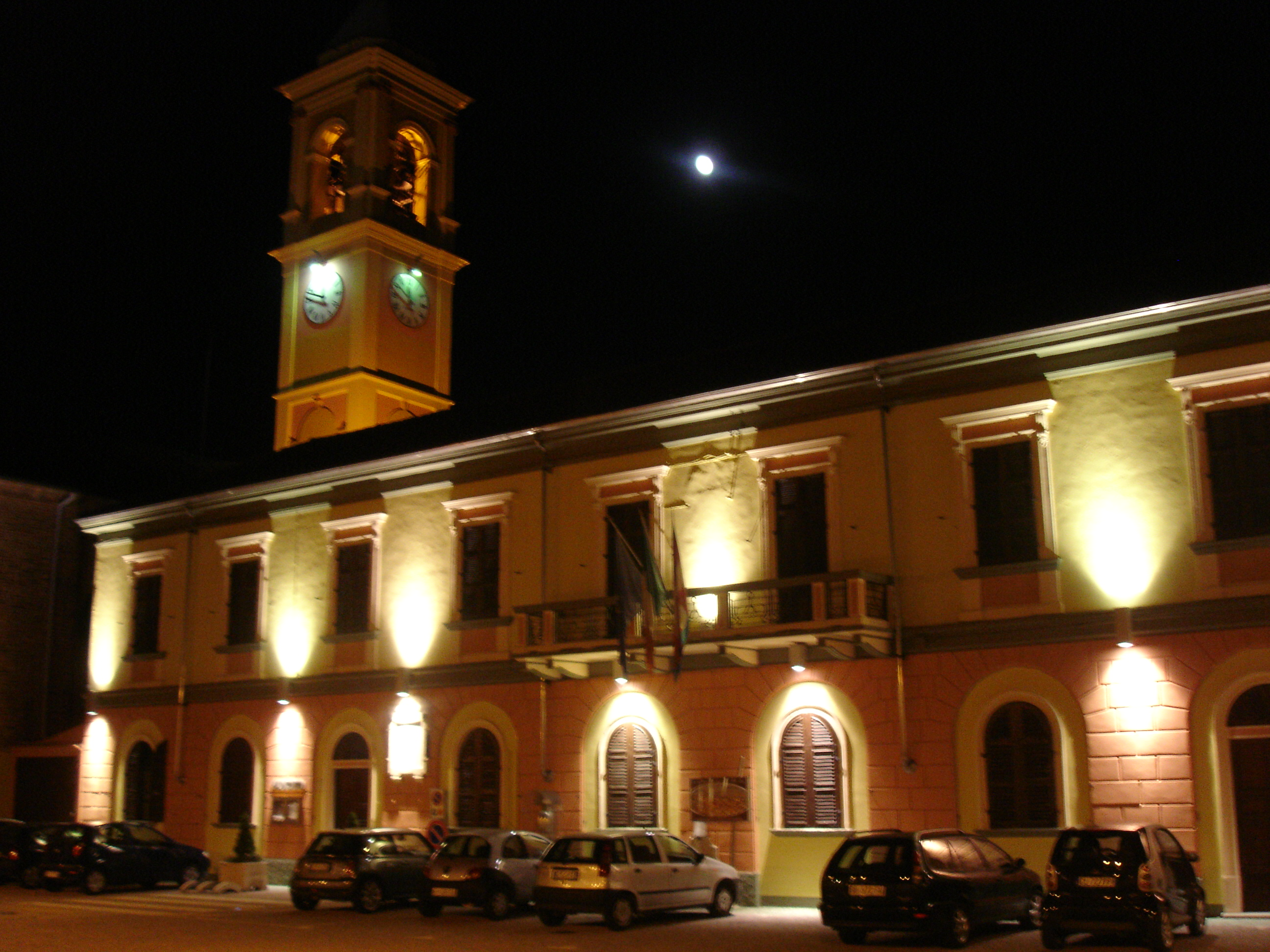 Municipio di Tricerro (provincia di Vercelli)